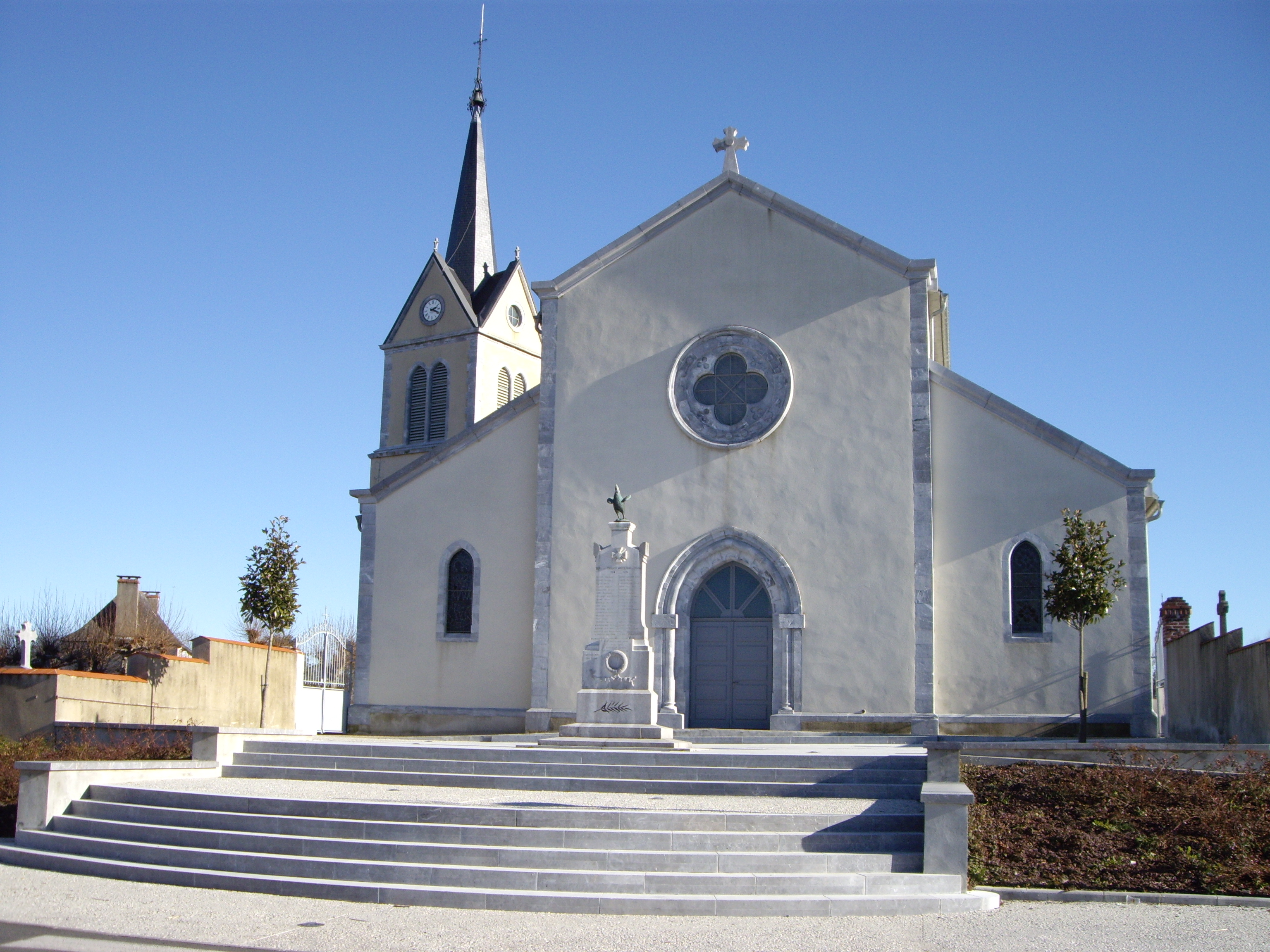 Église Saint-Pierre de Ger (64)